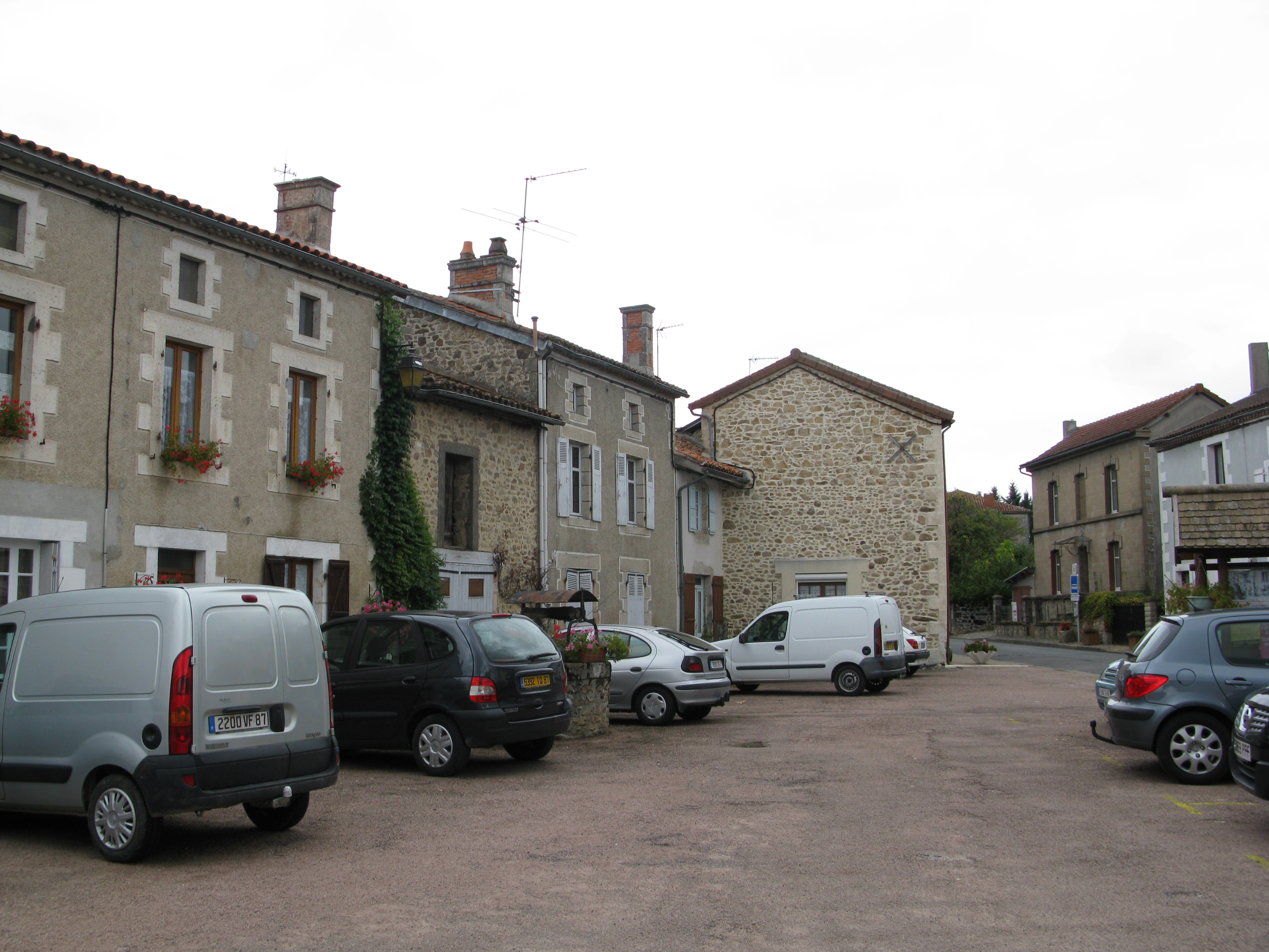 Maisonnais-sur-Tardoire, place centrale